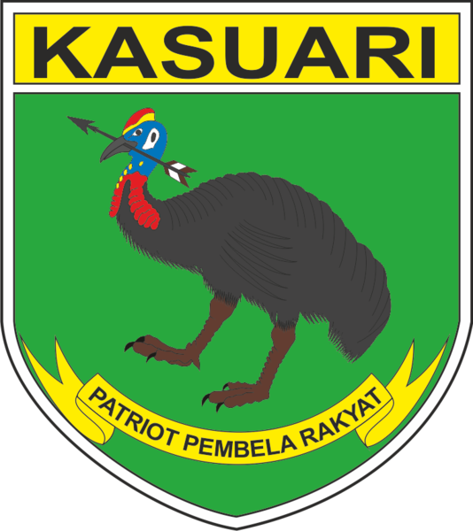 Lambang Kodam XVIII/Kasuari